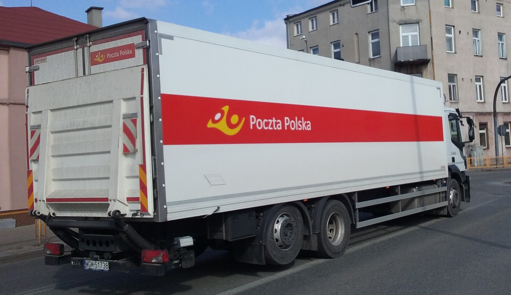 Tomaszów Mazowiecki w województwie łódzkim. Samochód do przewozów międzymiastowych Poczty Polskiej, Warszawska róŋ Szerokiej Tomaszów. PL, EU, CCO